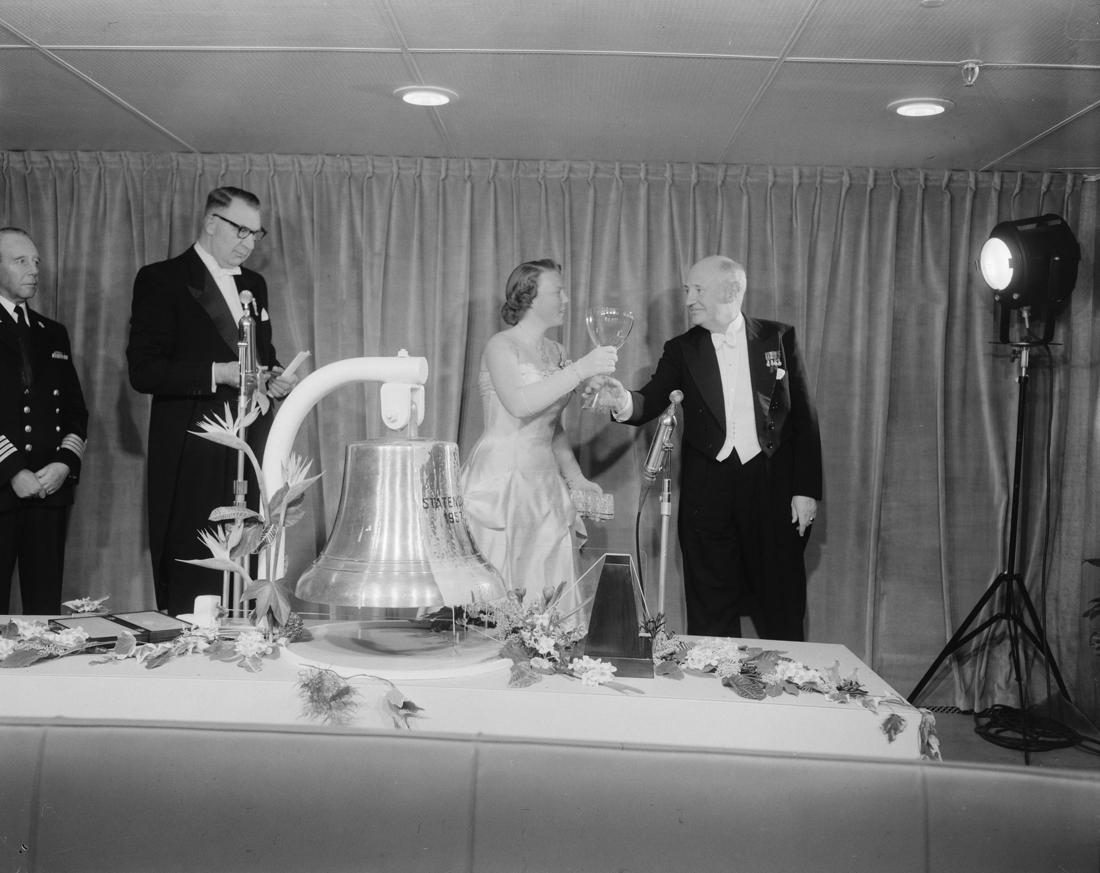 Collectie / Archief : Fotocollectie Anefo Reportage / Serie : Officiele proefvaart "Statendam" en doop door Prinses Beatrix Beschrijving : Officiele proefvaart "Statendam" en doop door Prinses Beatrix Datum : 23 januari 1957 Persoonsnaam : Beatrix, prinses Fotograaf : Bilsen, Joop van / Anefo Auteursrechthebbende : Nationaal Archief Materiaalsoort : Negatief (zwart/wit) Nummer archiefinventaris : bekijk toegang 2.24.01.04 Bestanddeelnummer : 908-2667